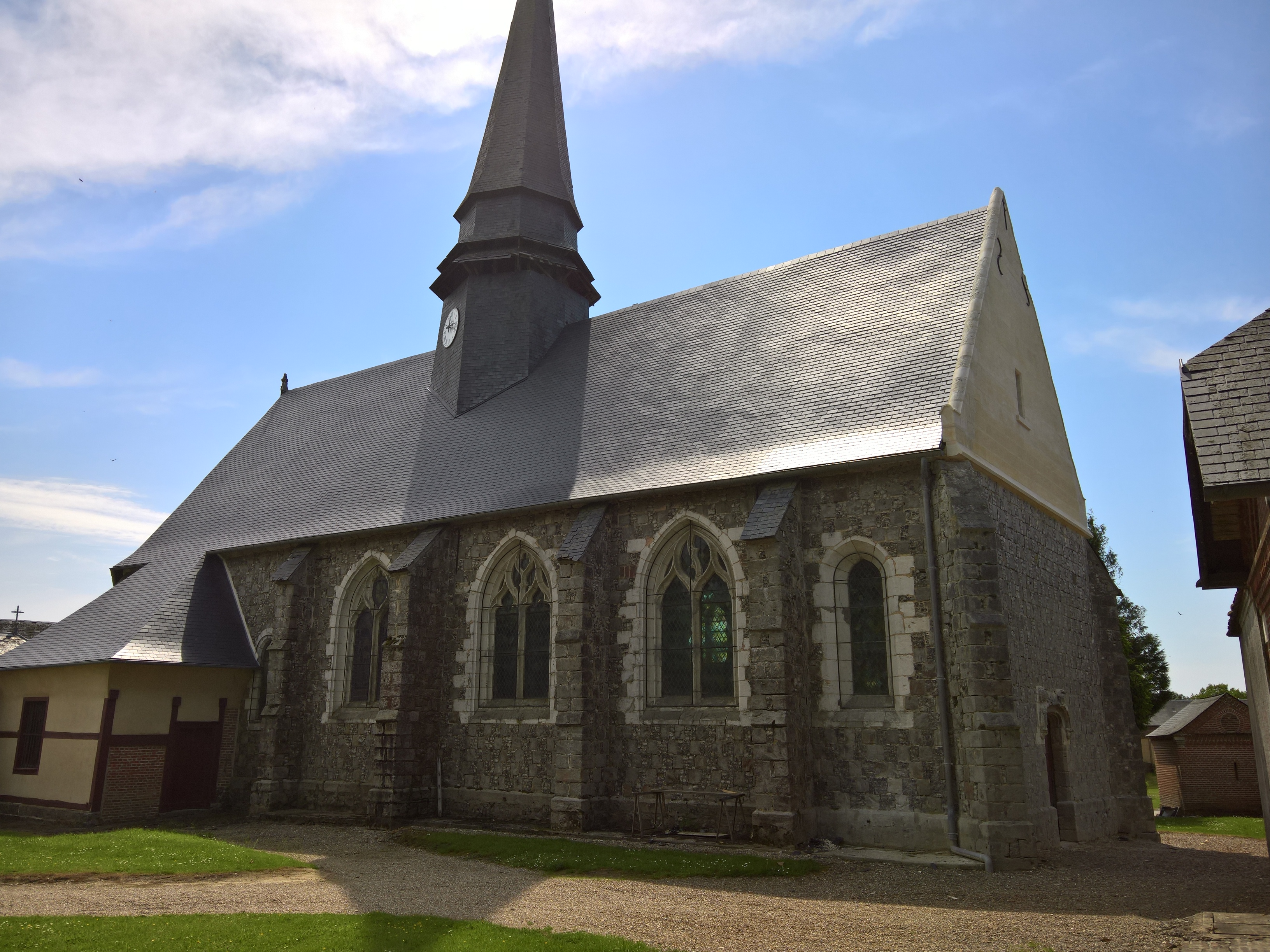 Eglise Saint-Pierre de Loueuse